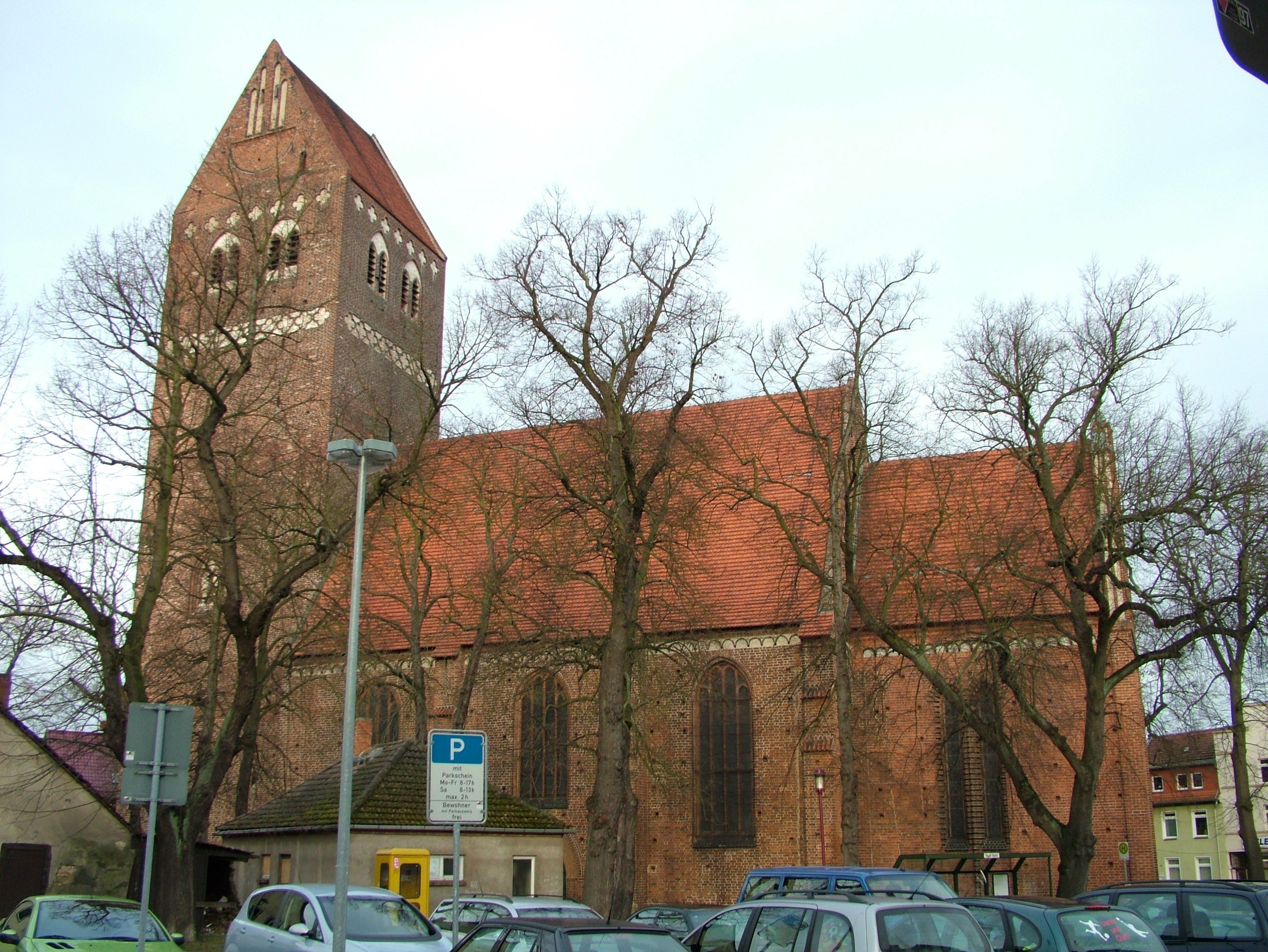 Parchim, Deutschland die Marienkirche am Alten Markt